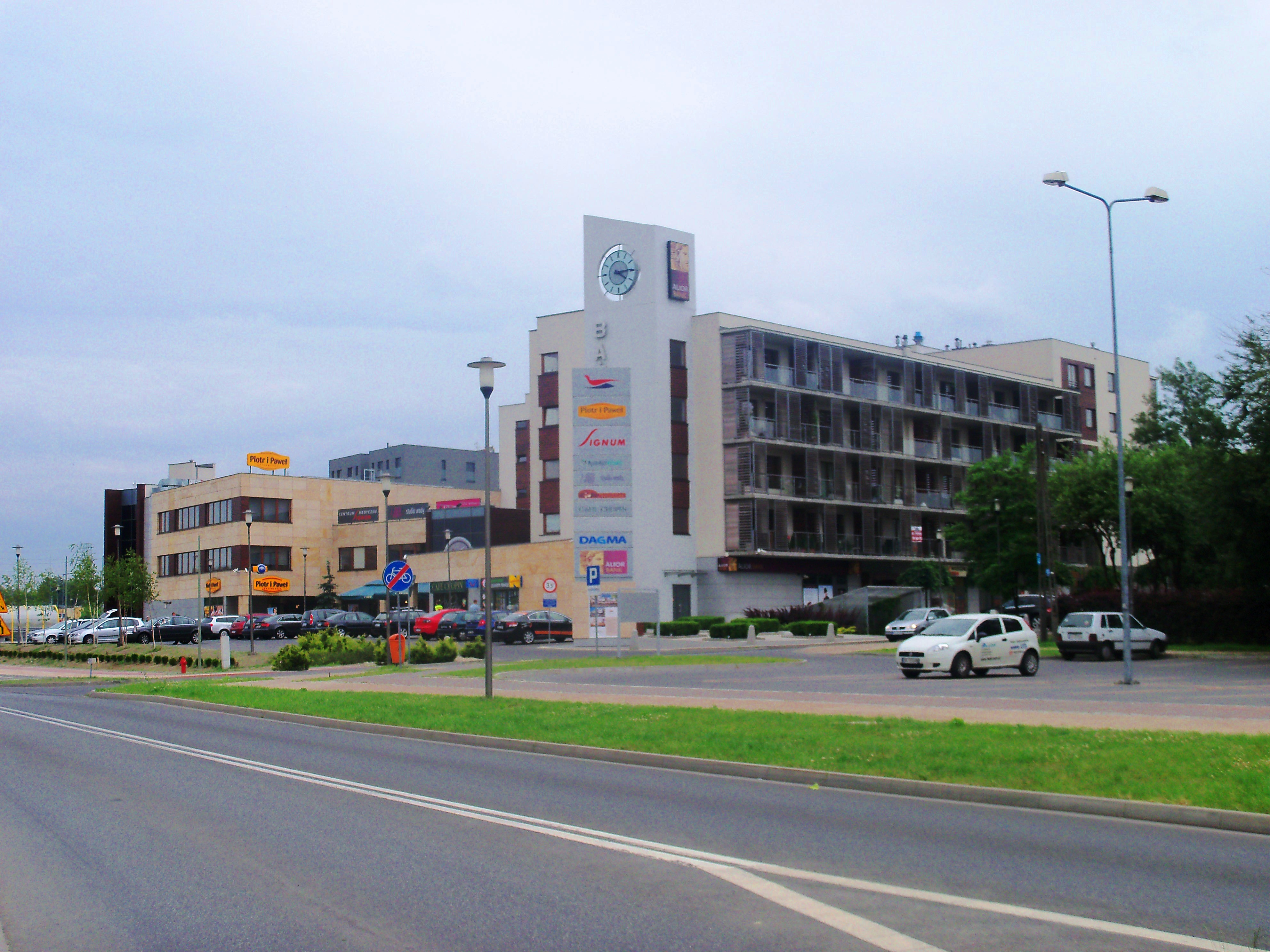 Osiedle Bażantów w Katowicach-Kostuchnie